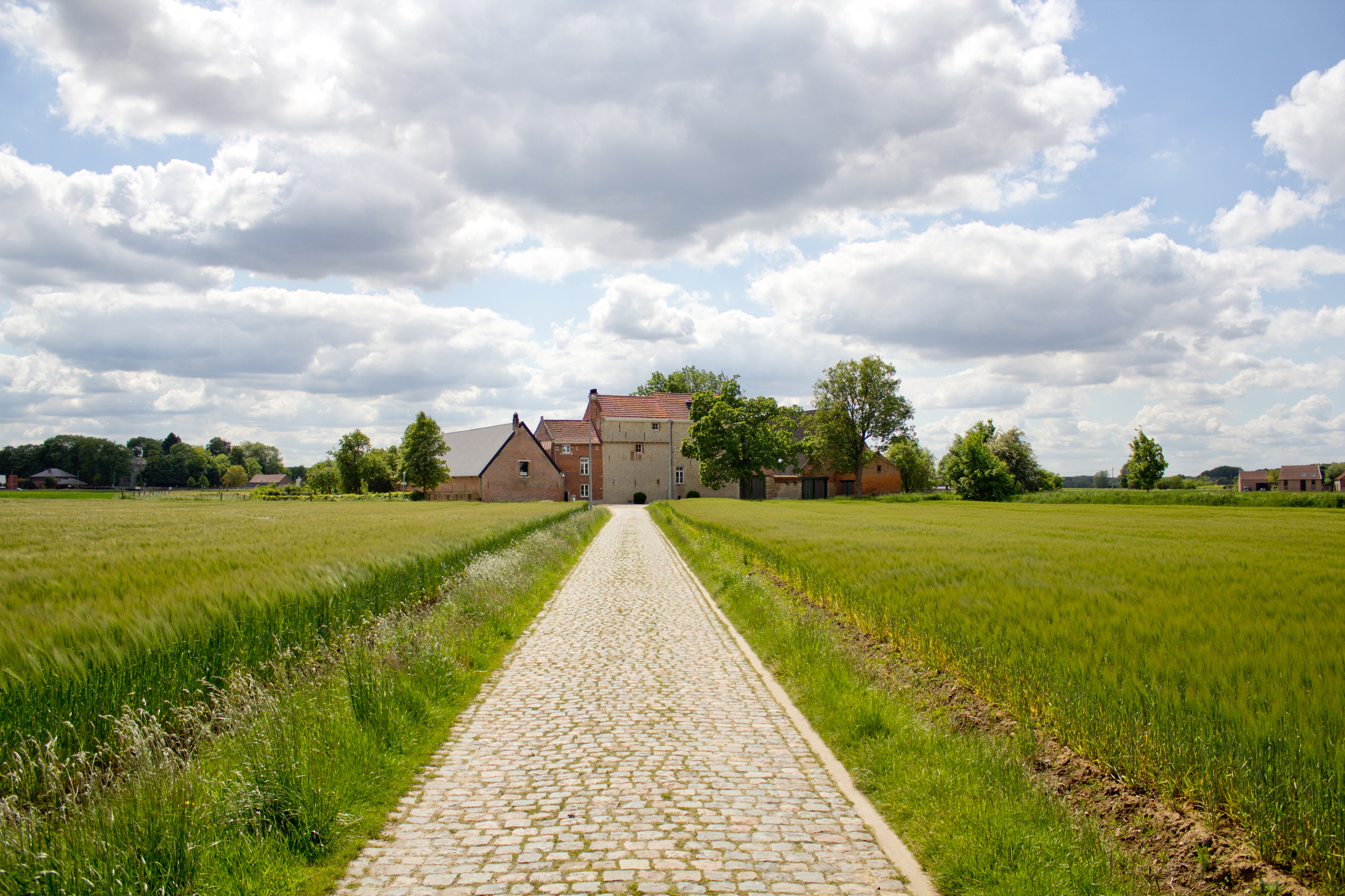 Duigemhof, Herent.